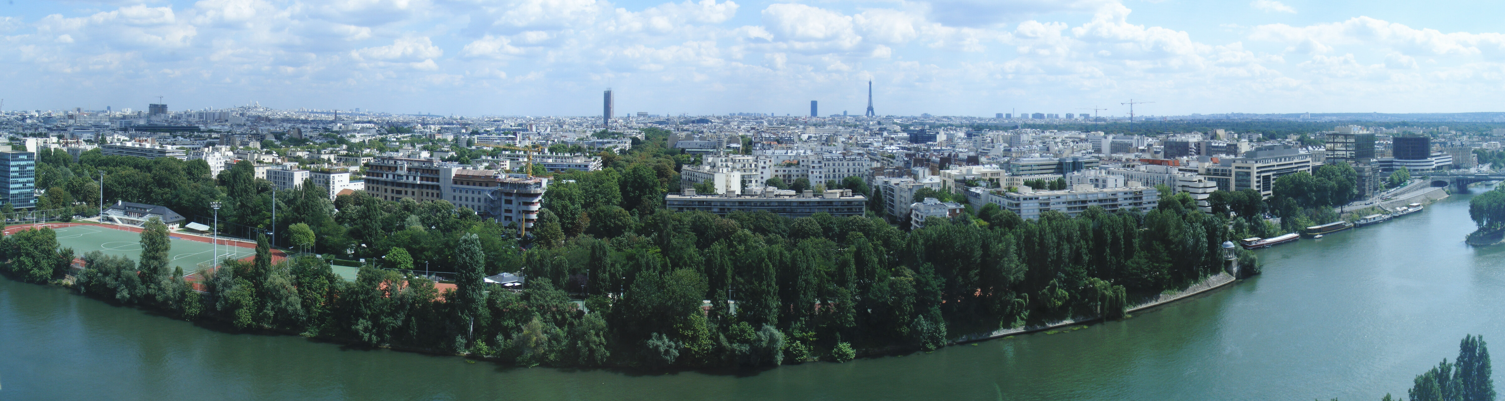 Panorama de Neuilly-sur-Seine au niveau de l'Île de la Jatte depuis Courbevoie. Panorama réalisé avec le logiciel Hugin en projection cylindrique à partir de trois photos 3264x2448.